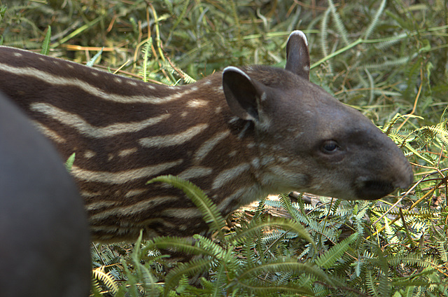 Tapirus terrestris, juvenile. Padre Cocha, Iquitos, Loreto, Peru.